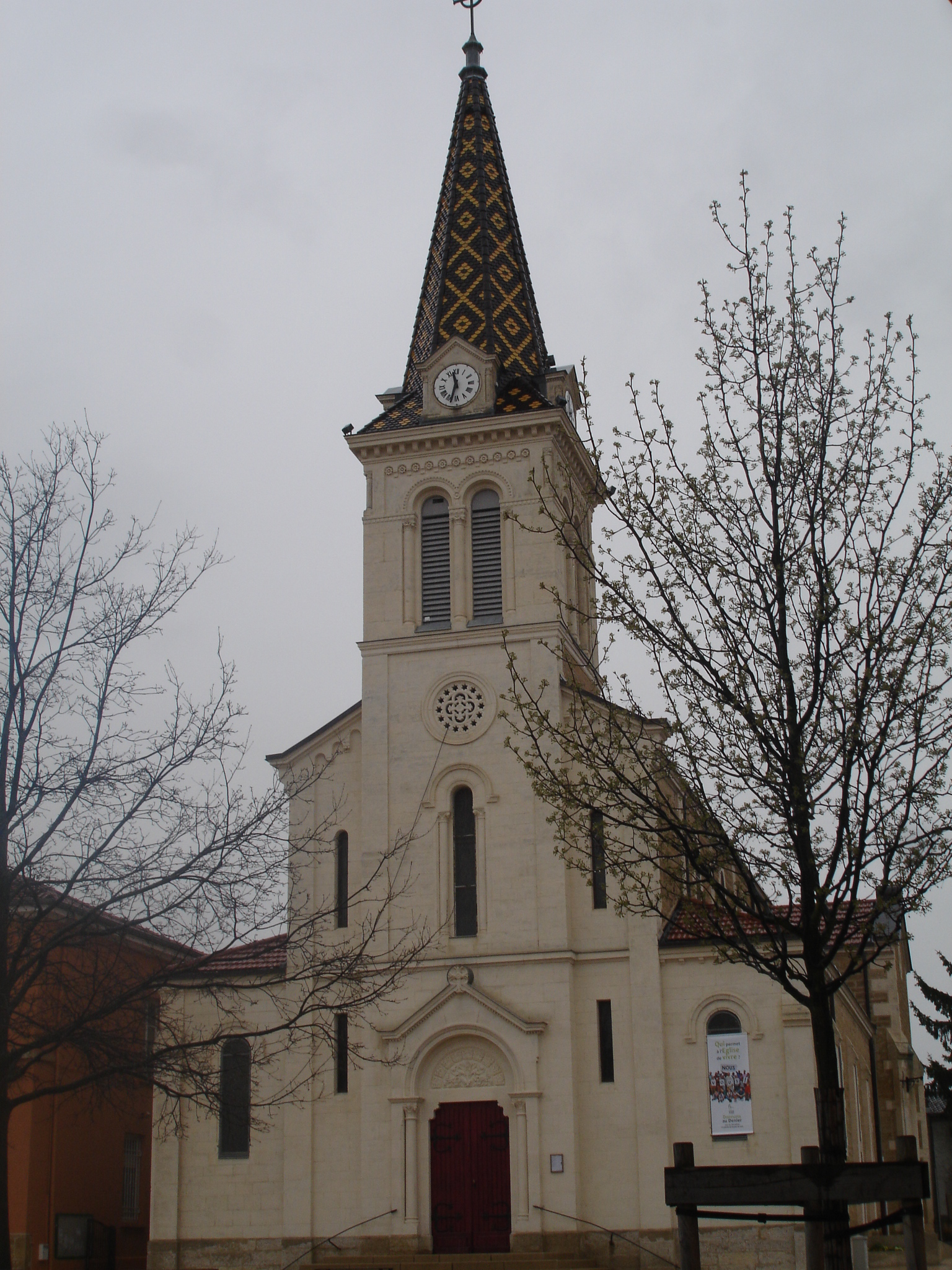 Mions (69) : l'église